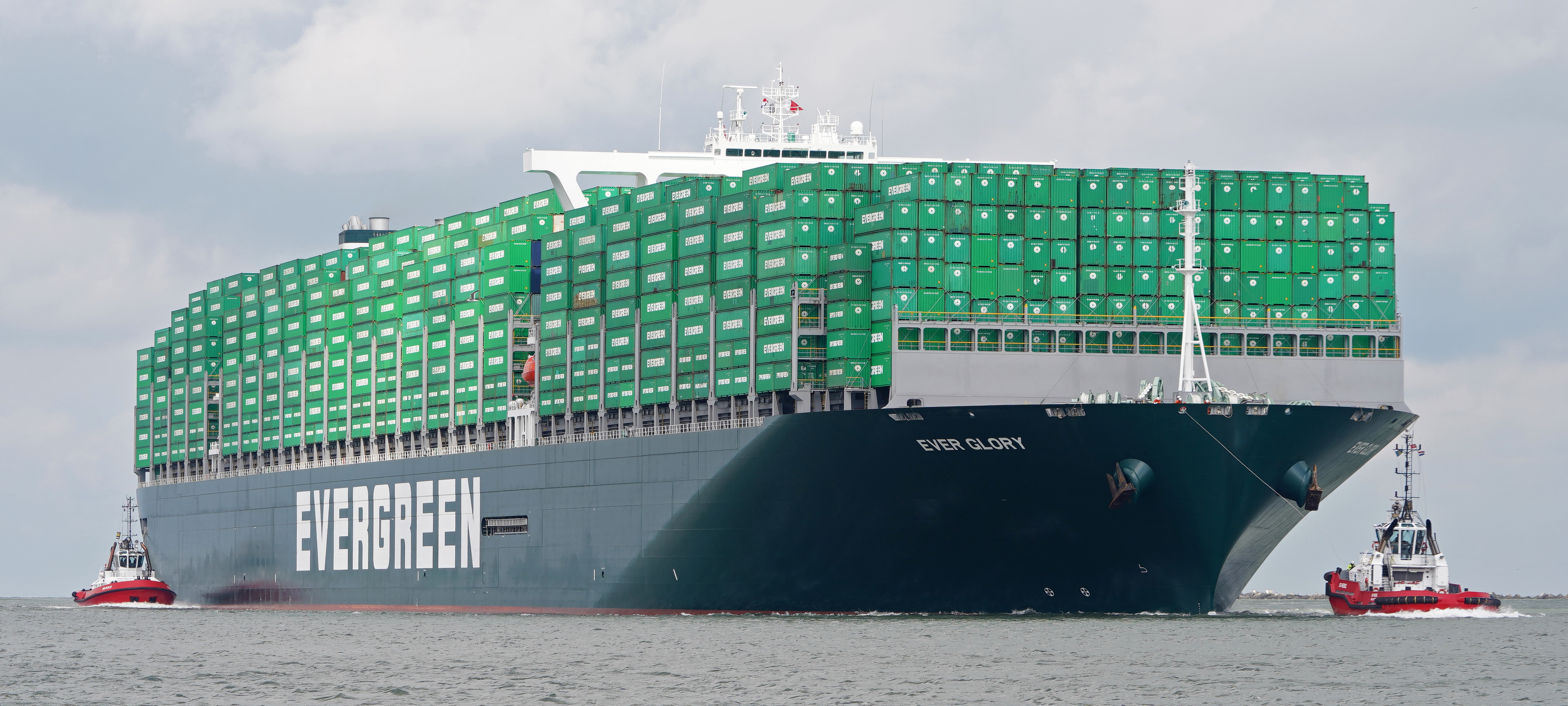 Aankomst van de Ever Glory van Evergreen in de Maasmond , omdat het gaat om een maidentrip en het eerste 20.000 TEU containerschip van de rederij dat bovendien is uitgerust met scrubbers, is het vaartuig (bijna) helemaal gestuwd met groene Evergreen containers , gezien vanaf het partyschip GEMINI die was gecharterd door het havenbedrijf van Rotterdam voor pers en (hobby) fotografen